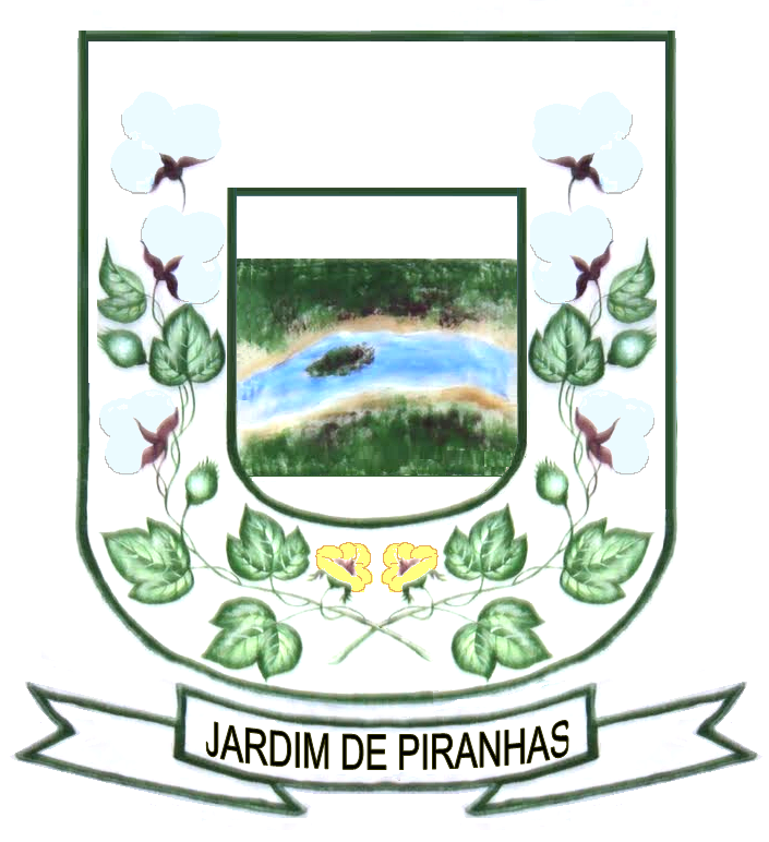 Brasão de Jardim de Piranhas, Rio Grande do Norte, Brasil.